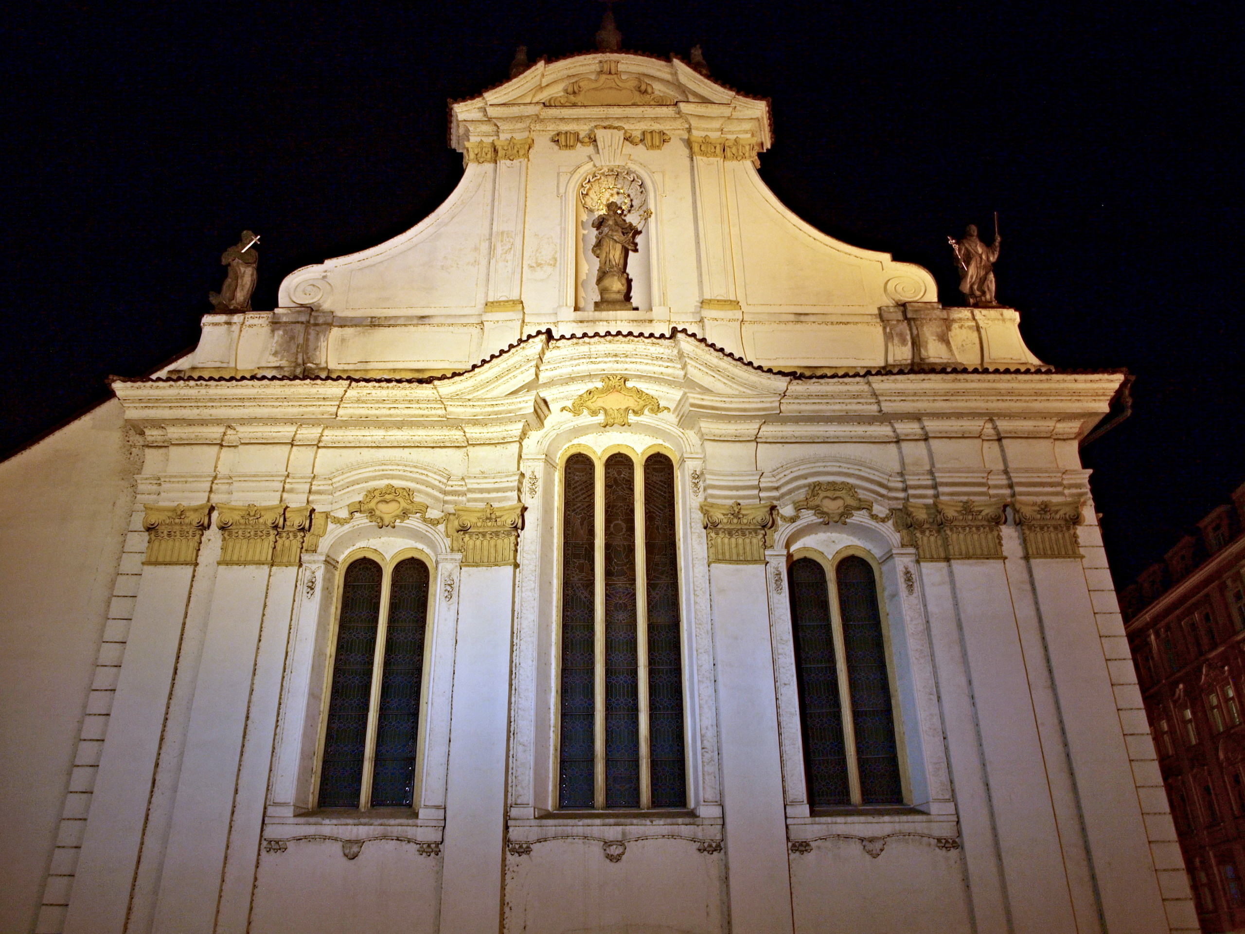 Praha 1-Staré Město, kostel sv. Šimona a Judy